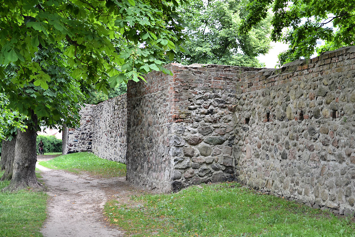 Myślibórz - mury miejskie